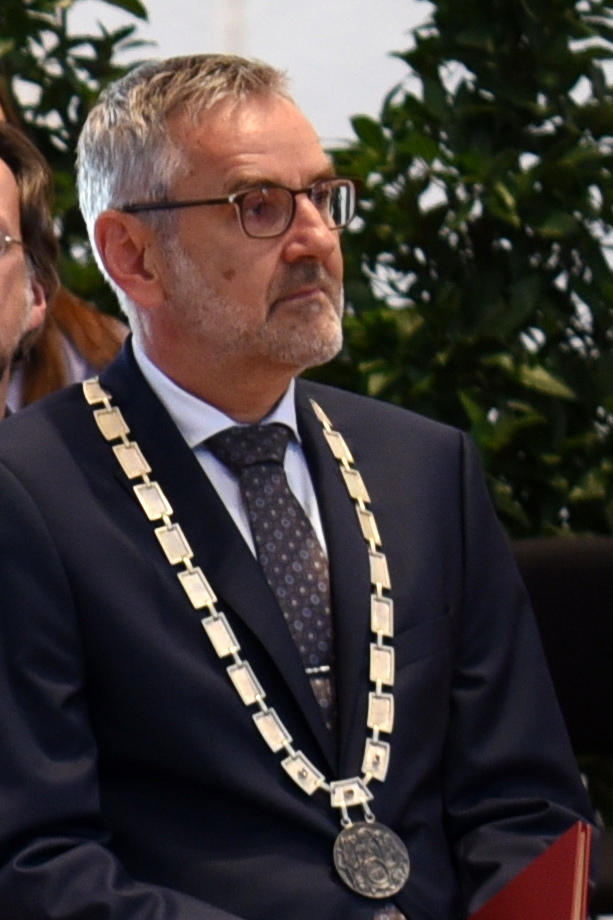 Alois Halbmayr, Dekan der Katholisch-Theologischen Fakultät an der Universität Salzburg